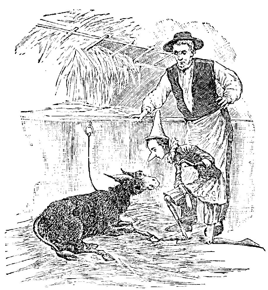 Illustrations from "Le avventure di Pinocchio, storia di un burattino", Carlo Collodi, Bemporad & figlio, Firenze 1902 (Drawings and engravings by Carlo Chiostri, and A. Bongini)